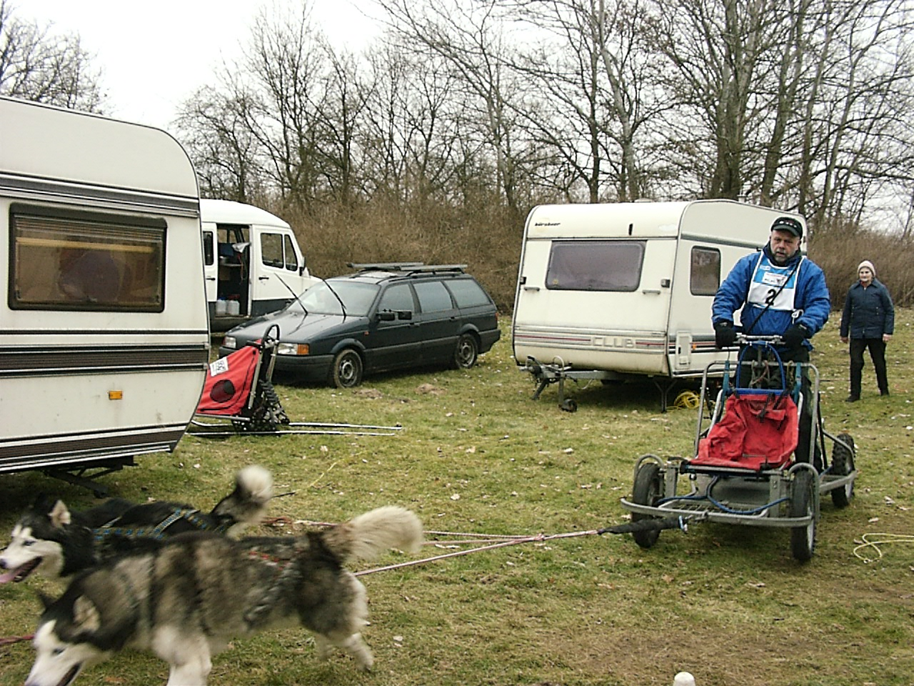 Trainingswagen für Schlittenhunde am 25. Februar 2006 bei einem Trainingsrennen auf Schloss und Gut Liebenberg, Brandenburg, Deutschland, veranstaltet durch die Deutsche Kreditbank, Berlin.